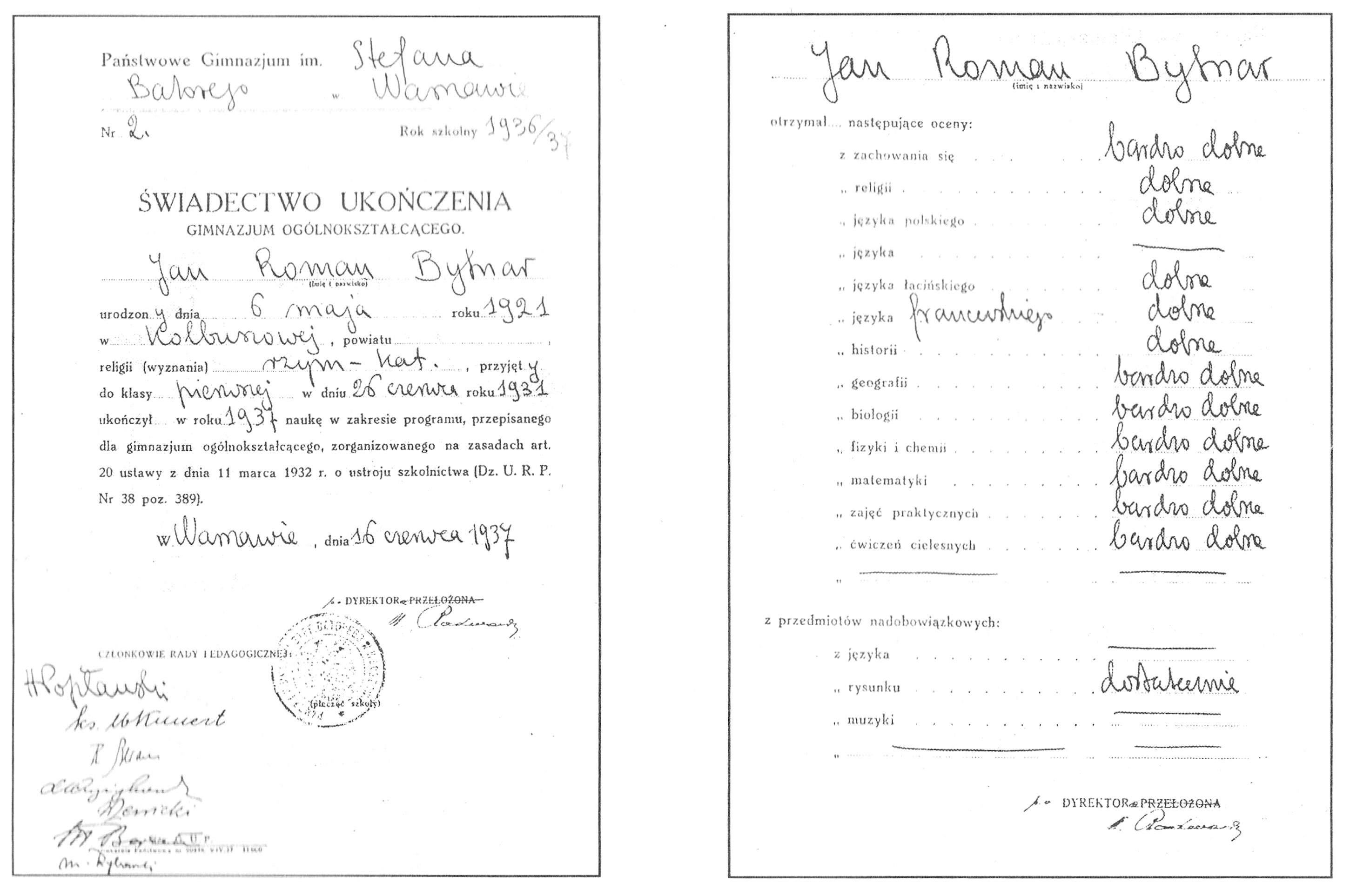 Świadectwo ukończenia przez Jana Bytnara gimnazjum ogólnokształcącego w Państwowym Gimnazjum im. Stefana Batorego w Warszawie